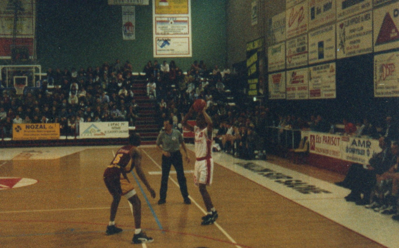 Match amical entre l'Elan Chalon et le Csp Limoges en mars 1996